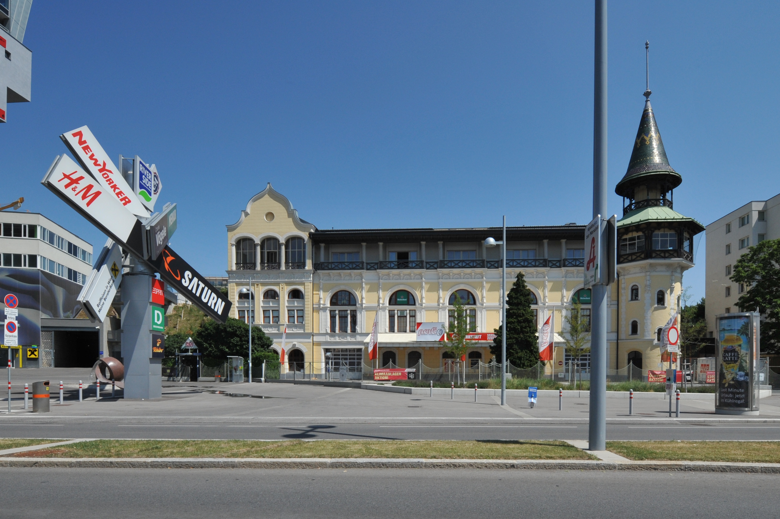 Gasthaus, Ehem. Liesinger Brauhaus-Restauration